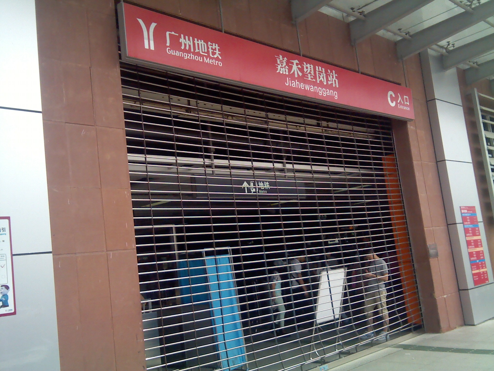 嘉禾望岗站C出入口（已封闭）